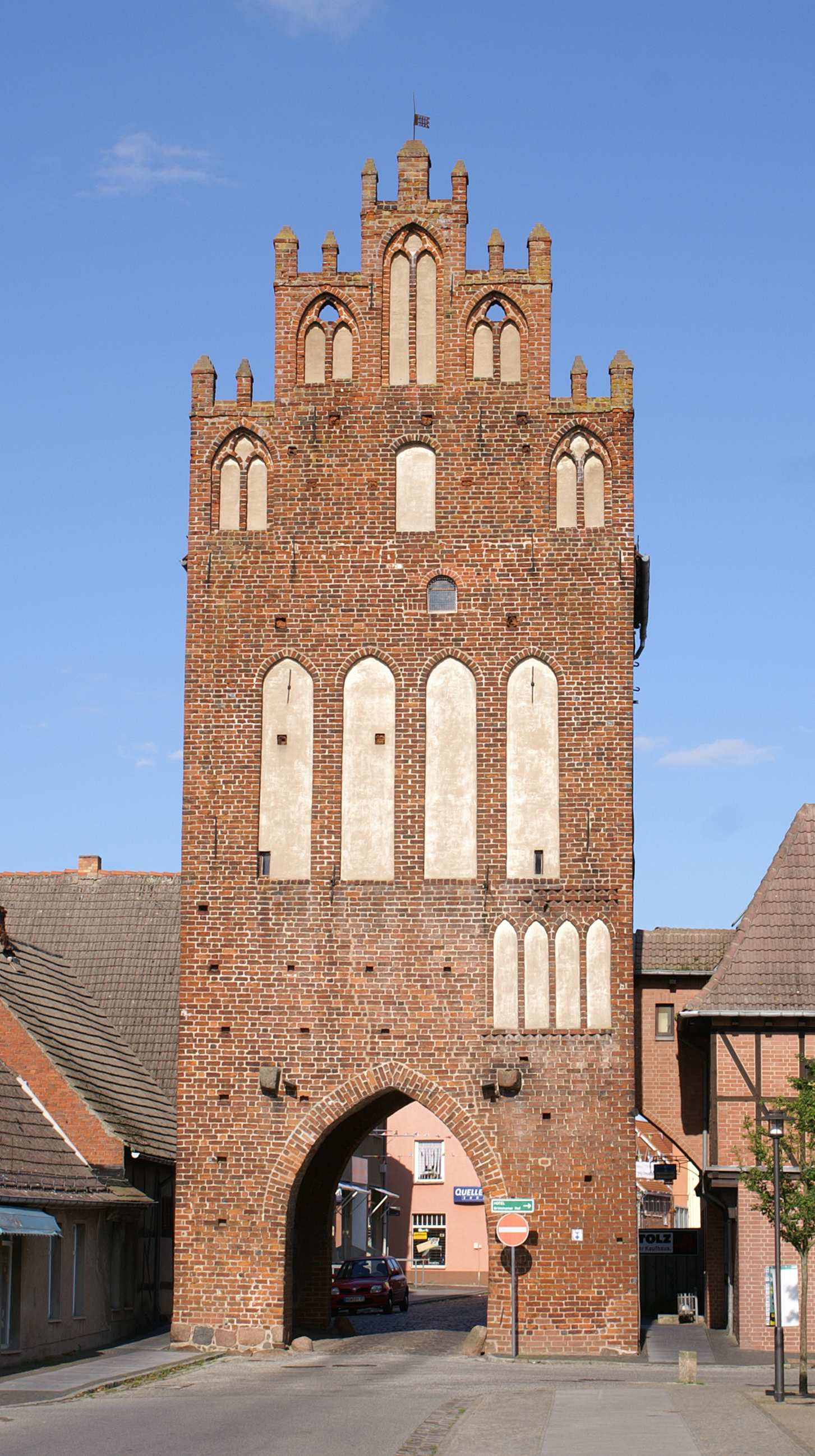 Grimmen - Landkreis Nordvorpommern - Mühlentor